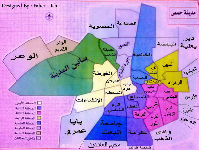 خريطة أحياء حمص